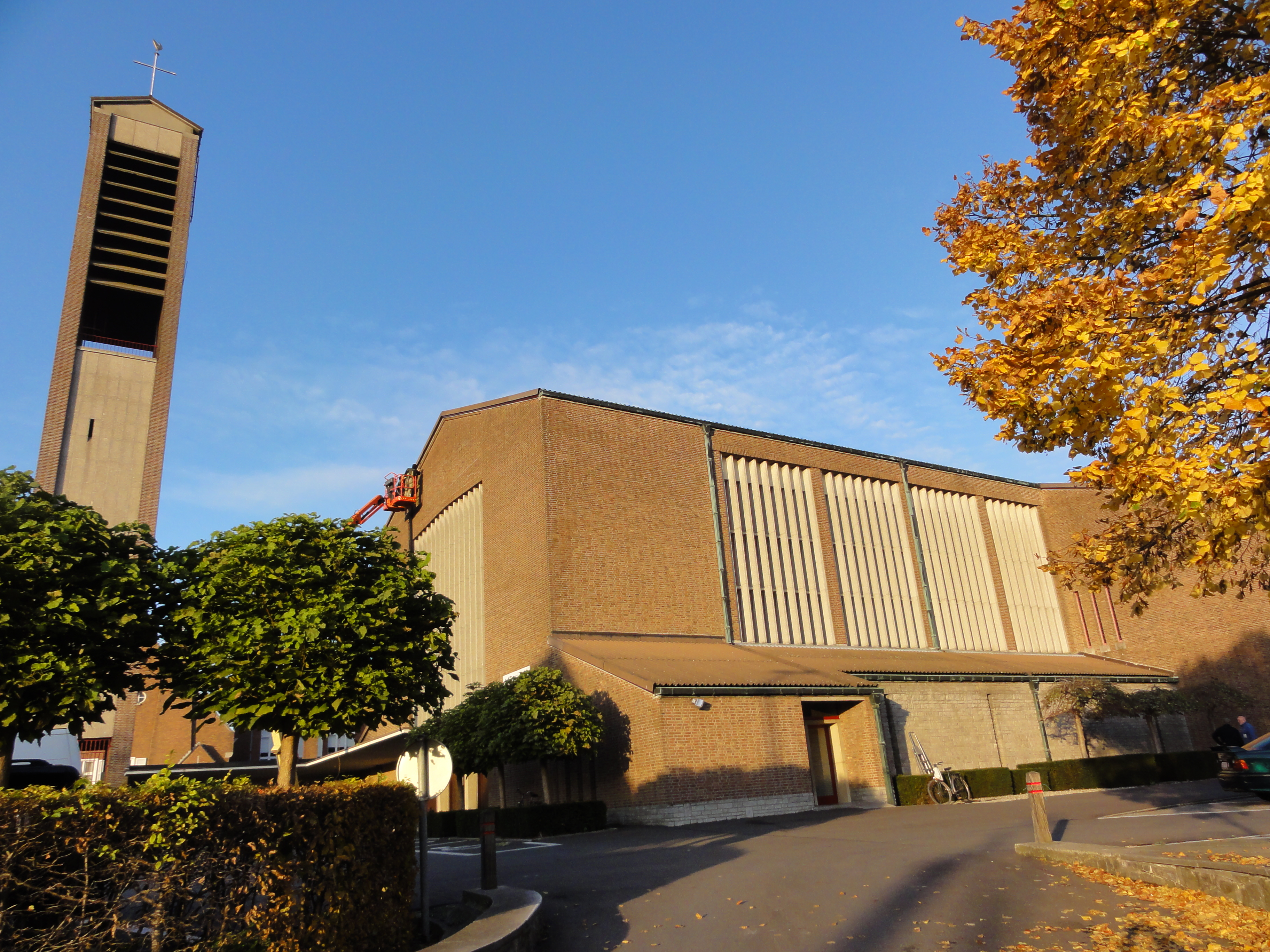 Christus Koningkerk in de wijk Hollebeek in Temse. Christus Koningkerk (Church of Christ the King) in the Hollebeek quarter in Temse. Temse, East Flanders, Belgium